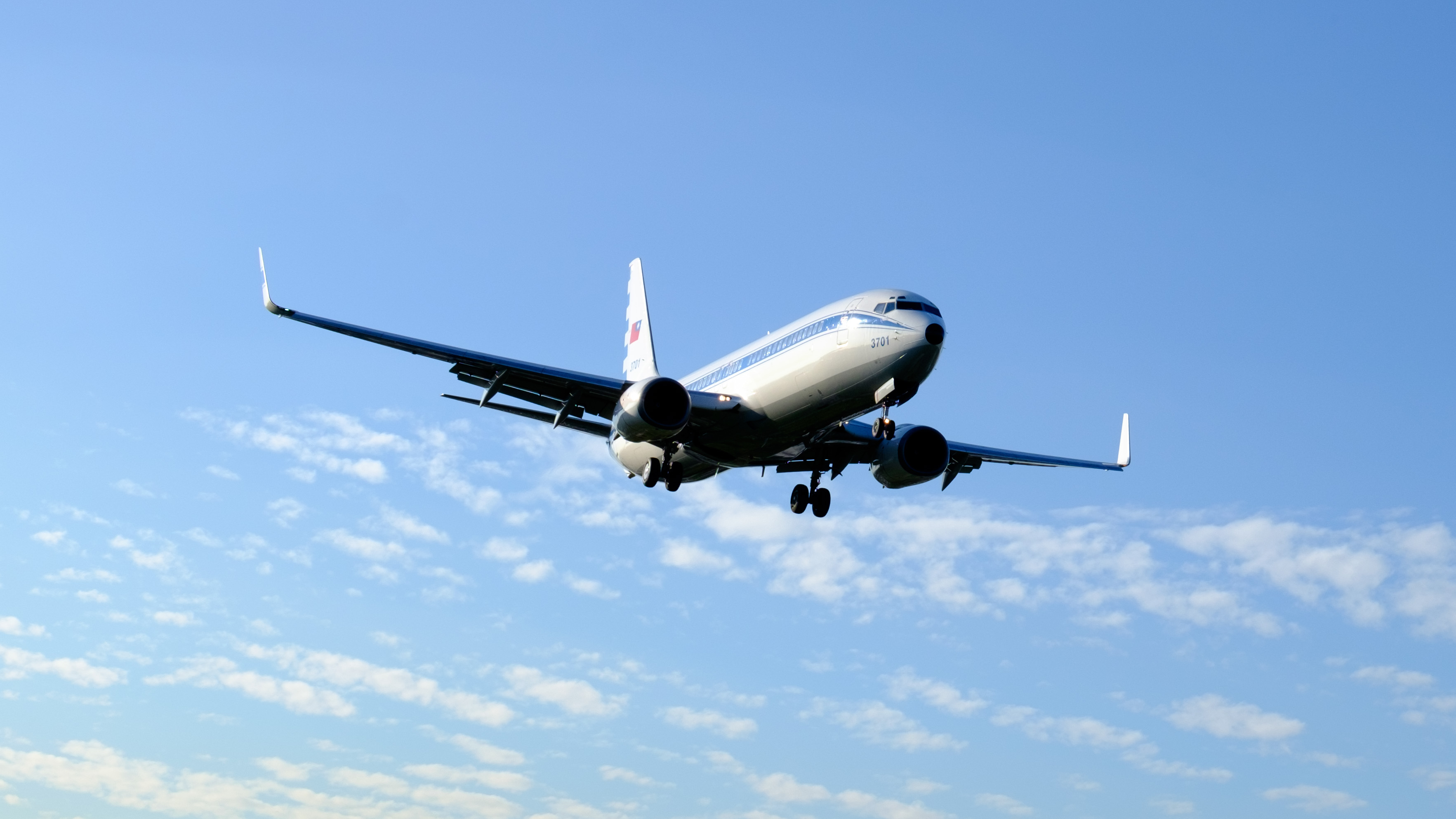 即將降落空軍松山基地的中華民國空軍波音737-800 3701。